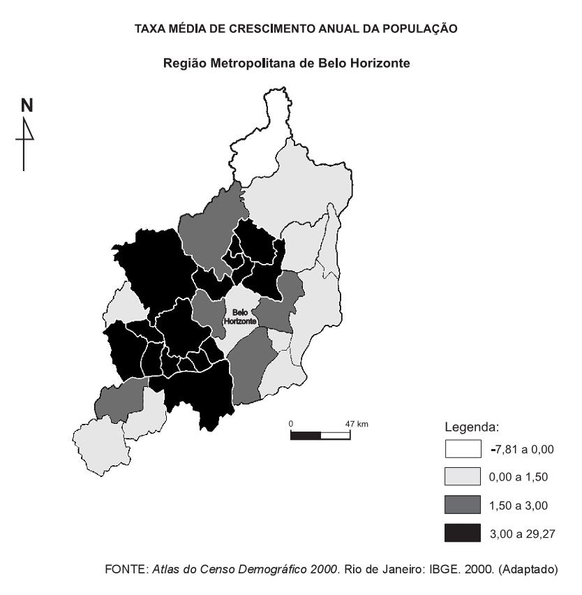 Taxa de Crescimento Anual da Região Metropolitana de BH